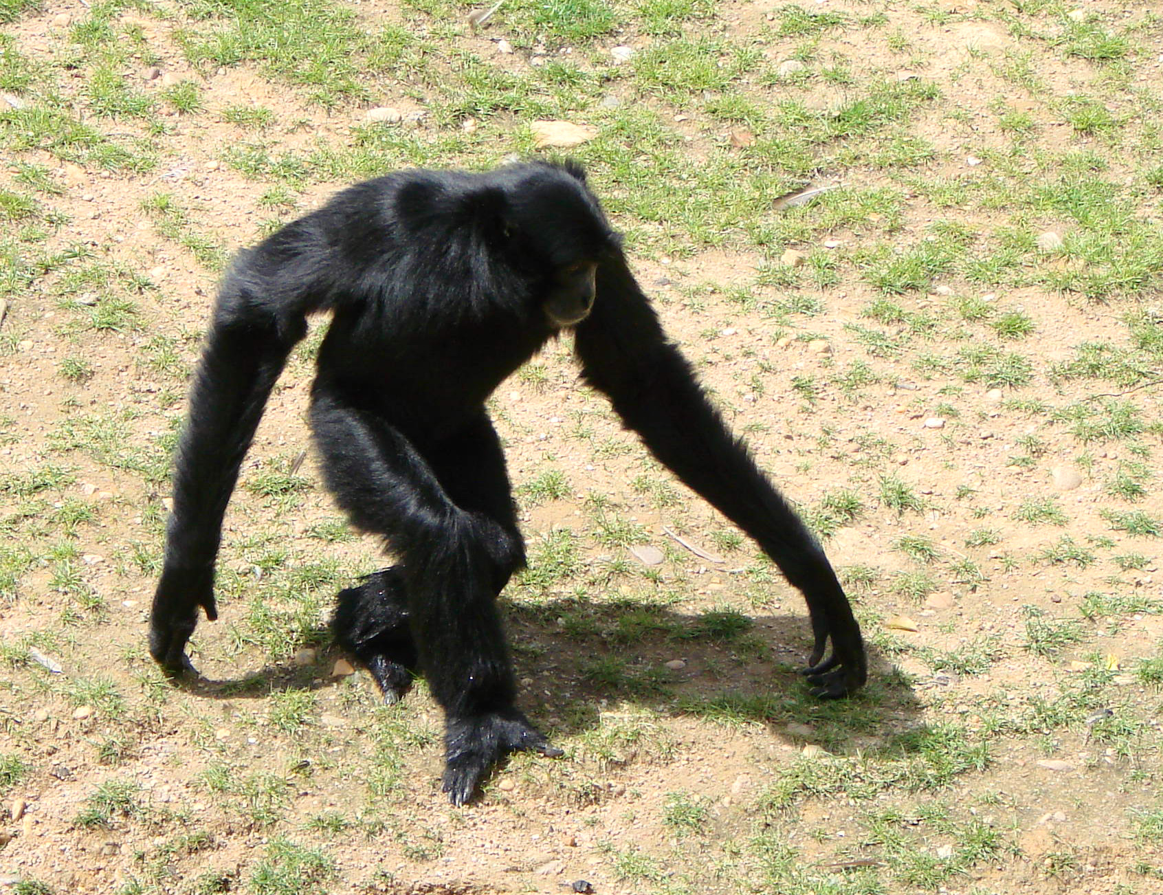 Siamang (Symphalangus syndactylus), zoo d'Amnéville.